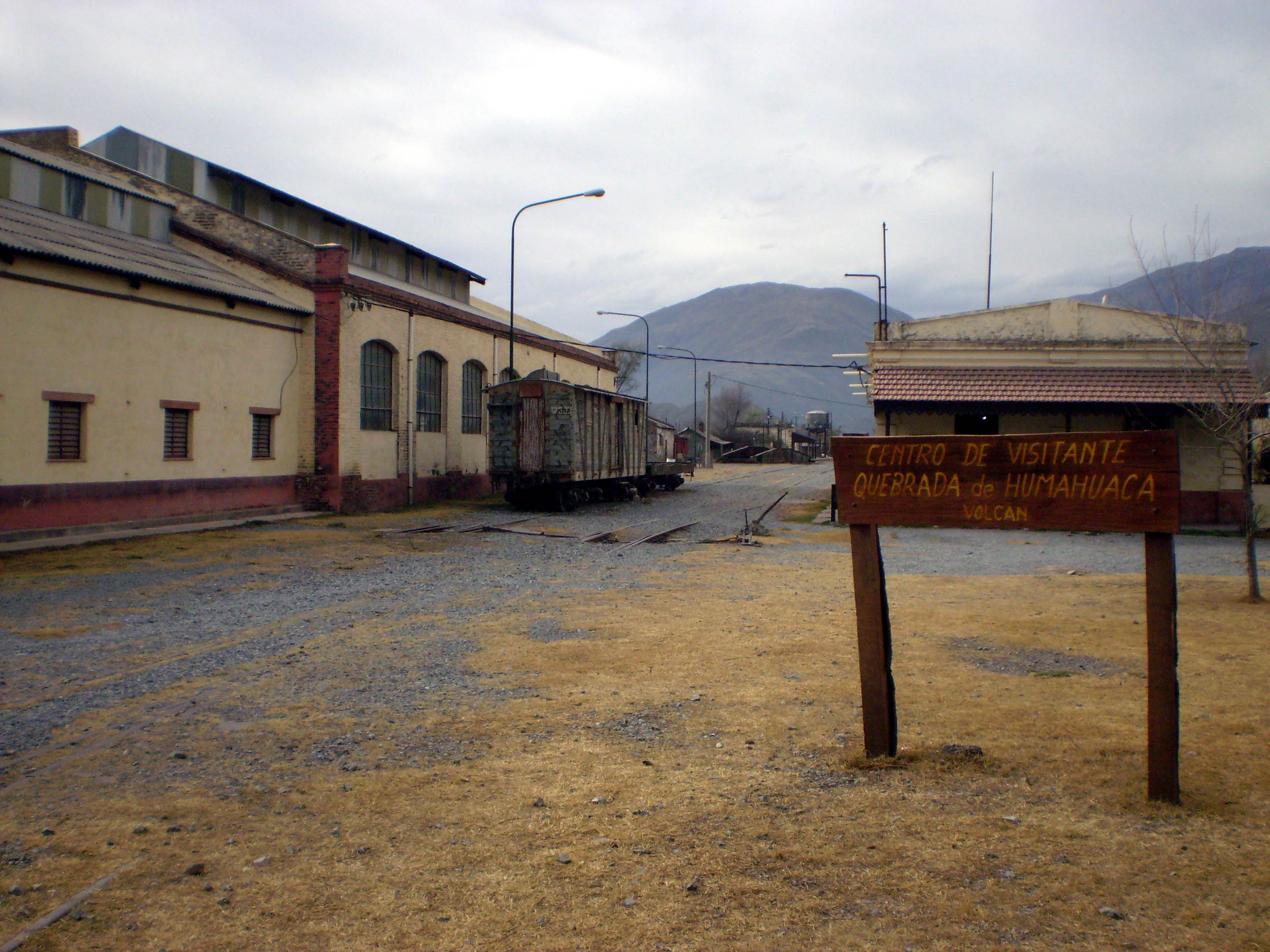 Centro del visitante en la localidad de Volcán (Jujuy), en la antigua estación del ferrocarril General Belgrano que unía las ciudades de La Quiaca y Tucumán.